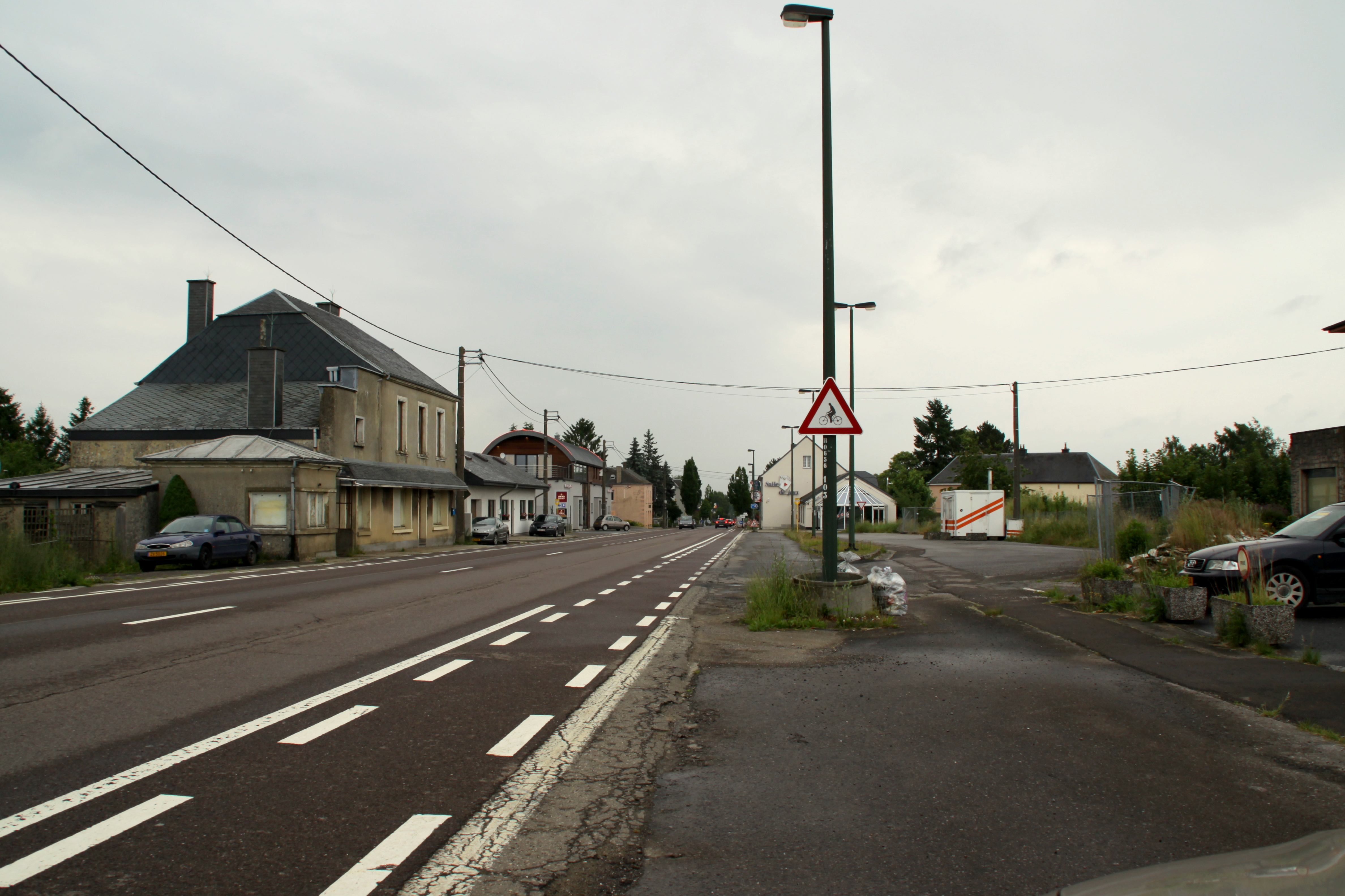 De Rousebierg aus Richtung Wollbierg gesinn